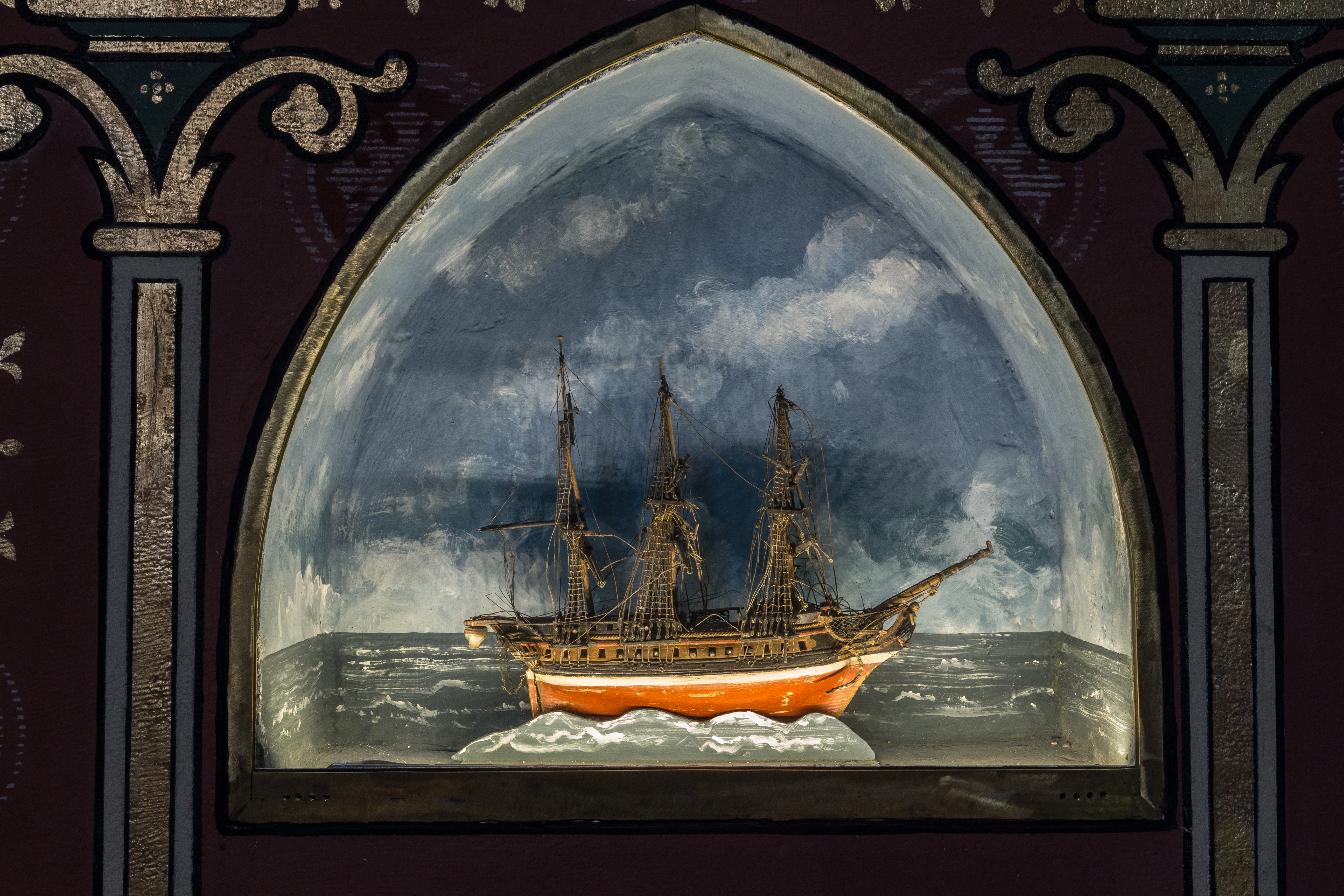 Chapelle de Condat Libourne Gironde